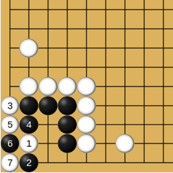 (Étape 4) Exemple de vie et mort dans les coins au jeu de go